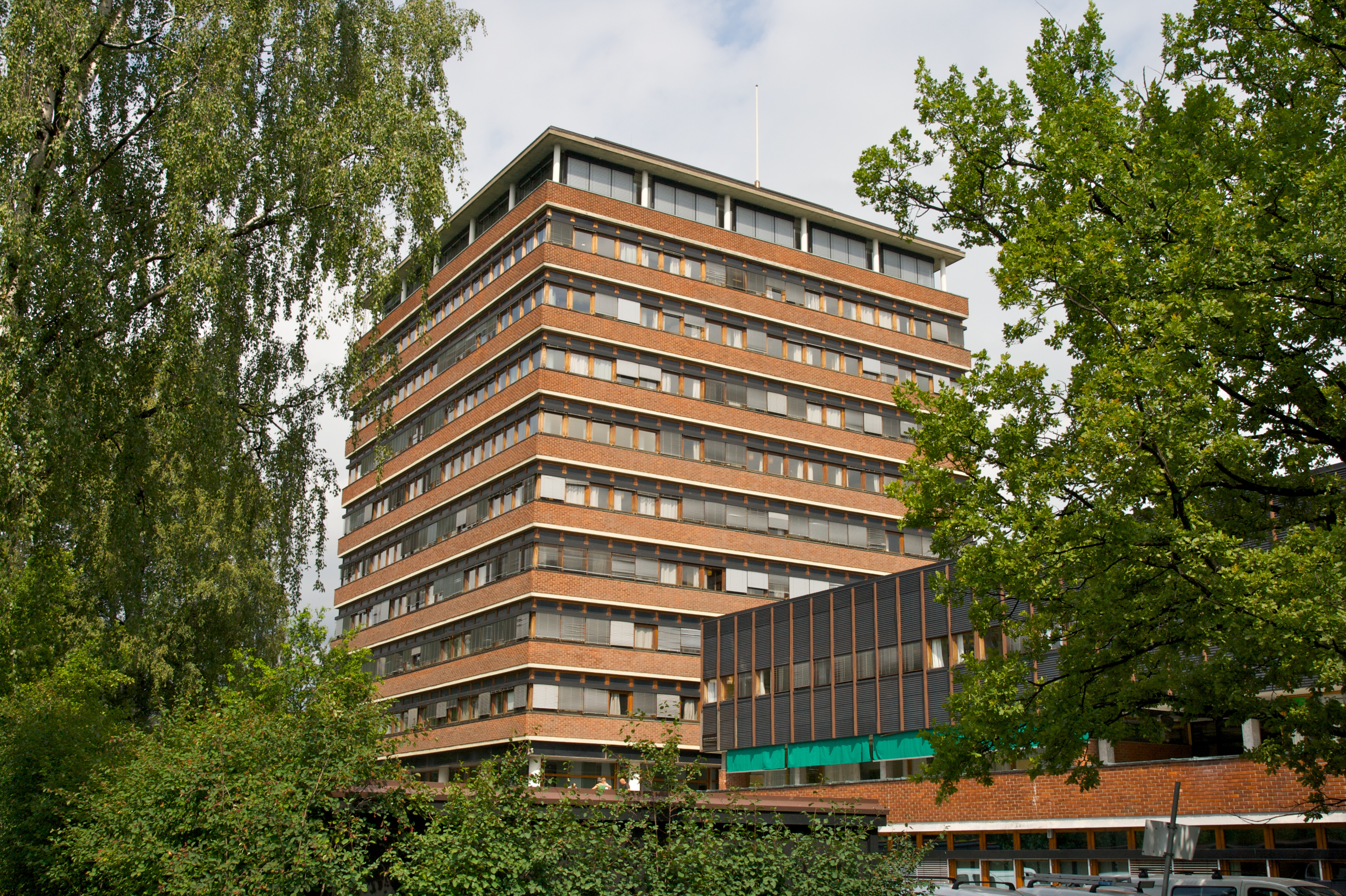 Administrasjonsbygningen, Blindern.